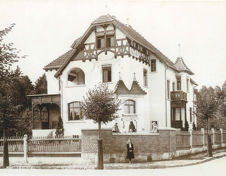 um 1902 - Villa Odin mit Verkaufstafel "Diese elegante Villa verkauft der Erbauer Baumeister Gänzel"